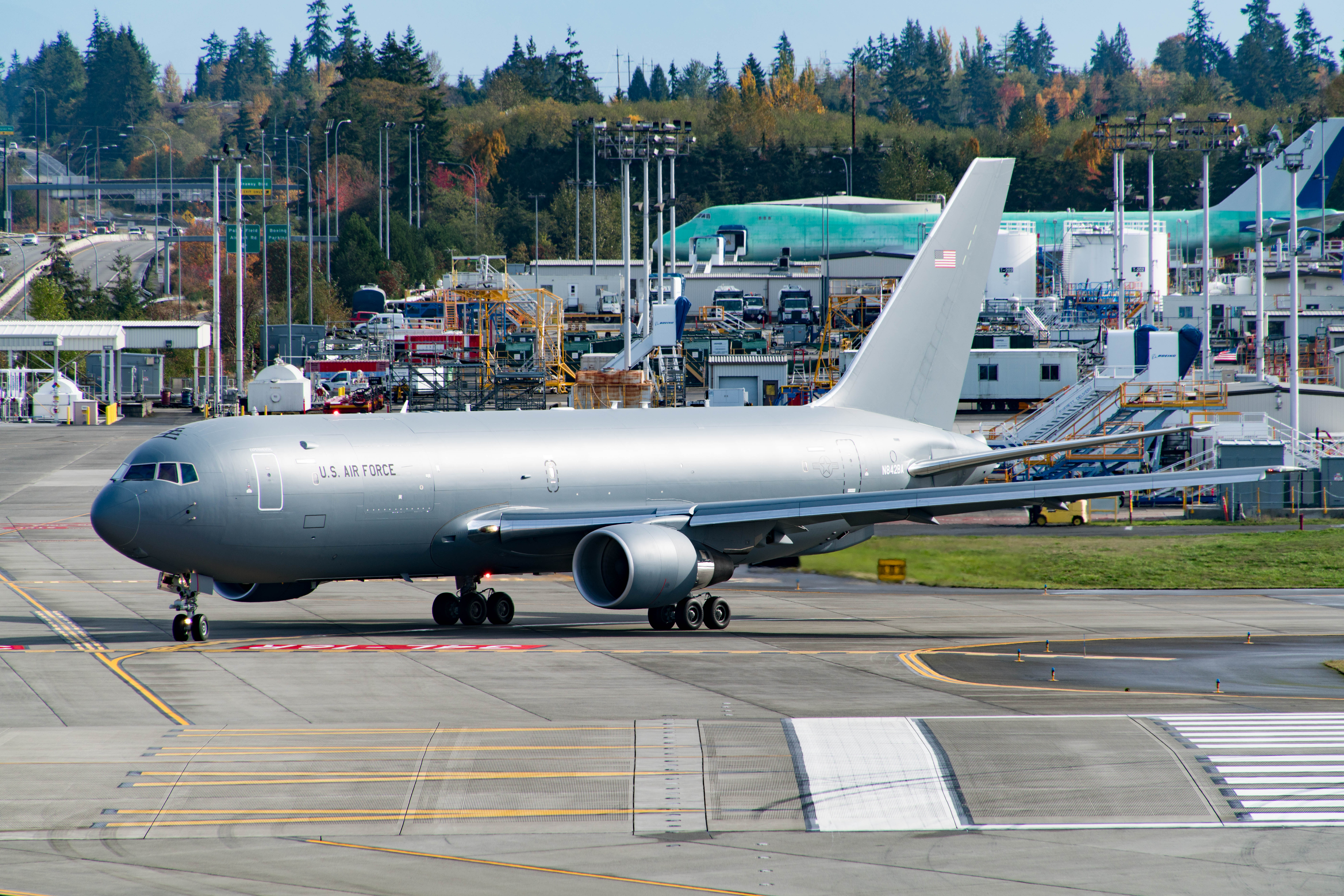 Boeing KC-46 at Paine Field